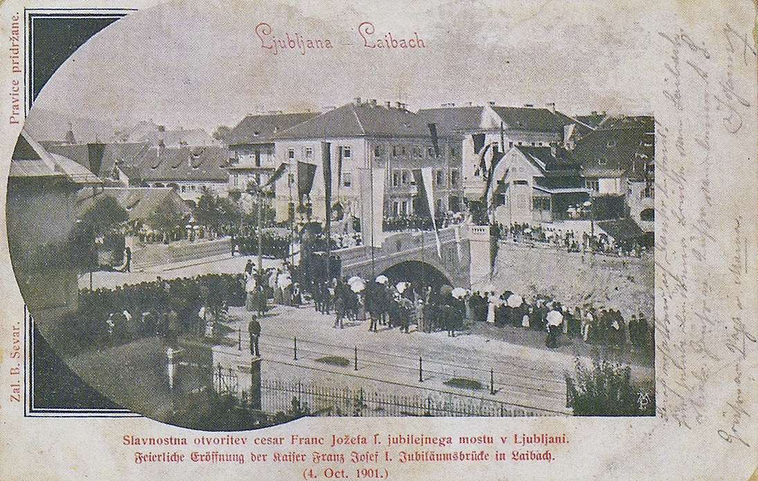 Razglednica otvoritve zmajskega mosta v Ljubljani.